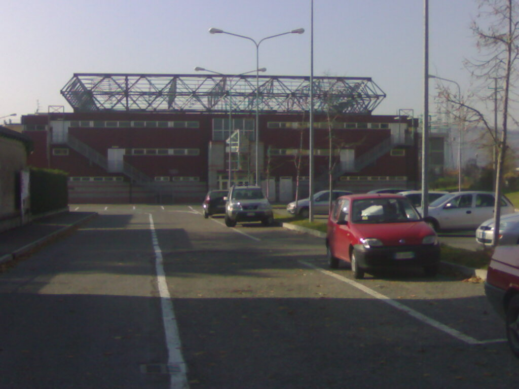 Palazzetto dello Sport di Vignole Borbera, costruito nel 1994.